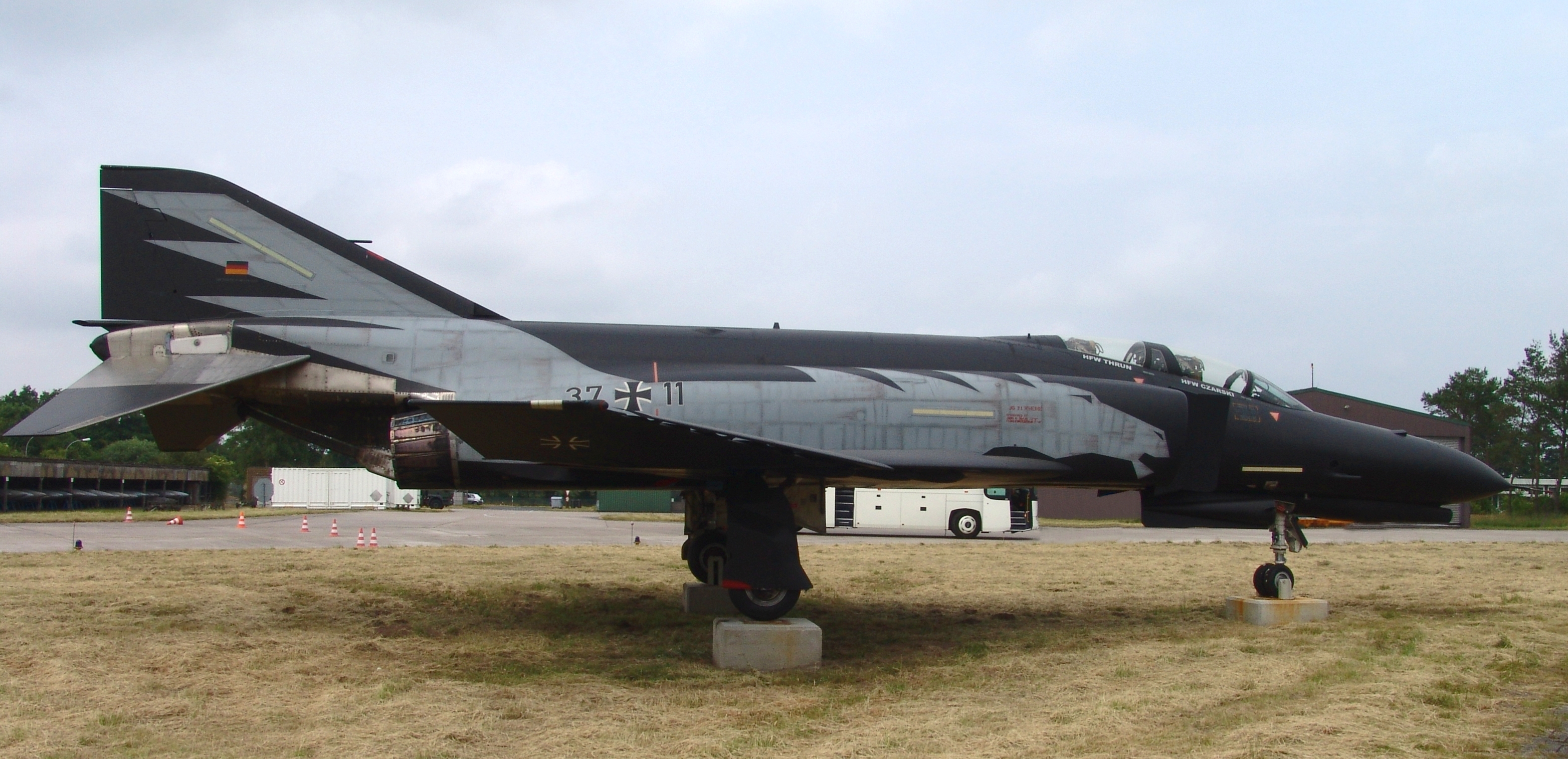 F-4F Phantom II "Black Beauty" des ehemaligen Jagdgeschwaders 72 "Westfalen" und späteren Fluglehrzentrum F4F nach dem letzten Flug der Einheit. Gesockelt auf dem Fliegerhorst Wittmund beim Jagdgeschwader 71 "Richthofen".